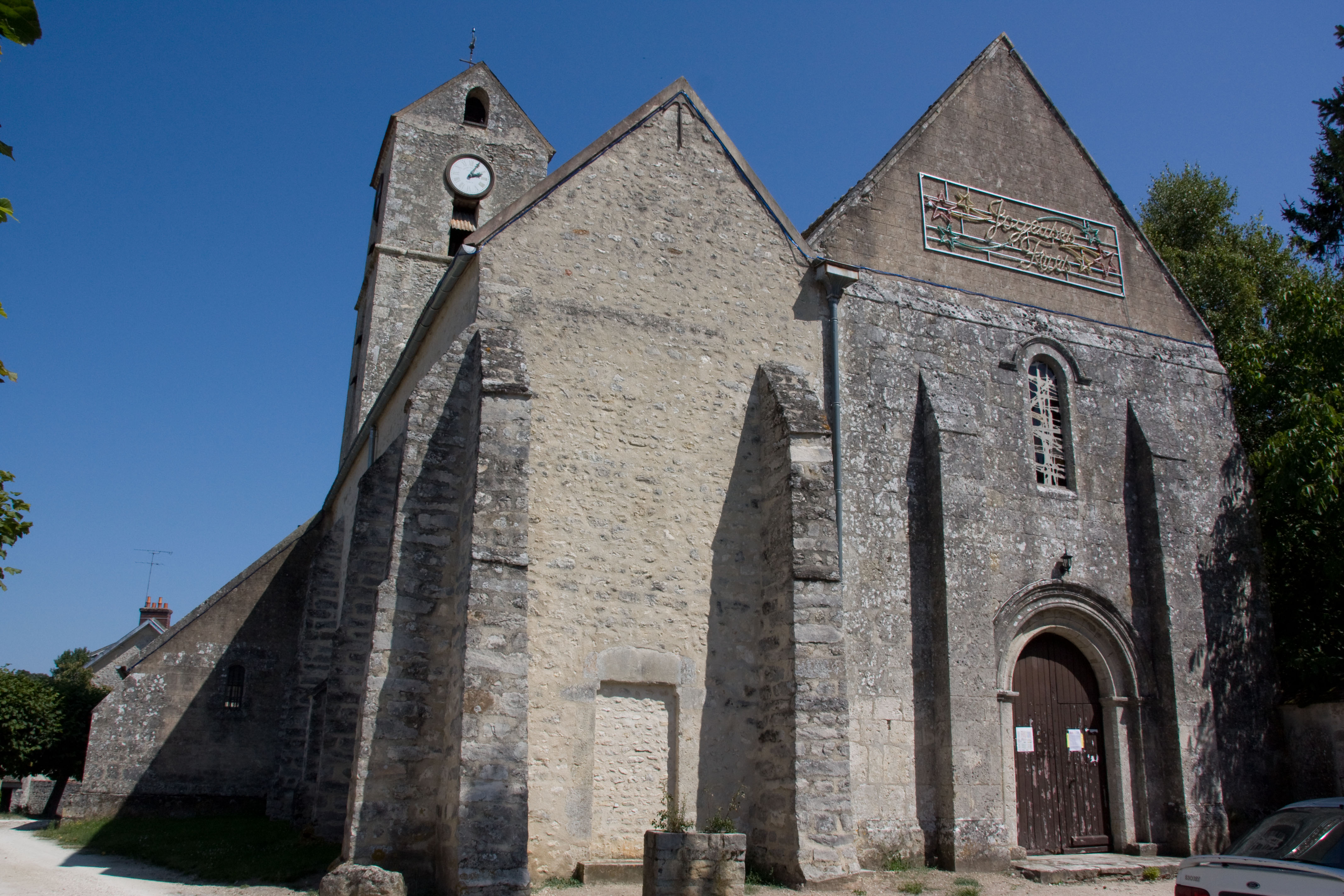 Eglise de Buno-Bonnevaux, Buno-Bonnevaux, Essonne, France